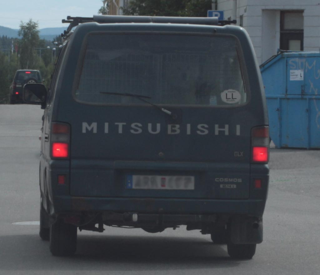 Laplandske kendingsbogstaver set i Lycksele.